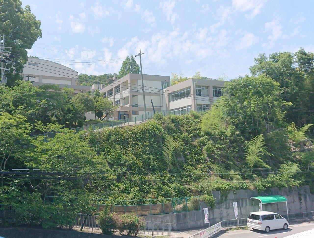 外観（歩道橋上より撮影）